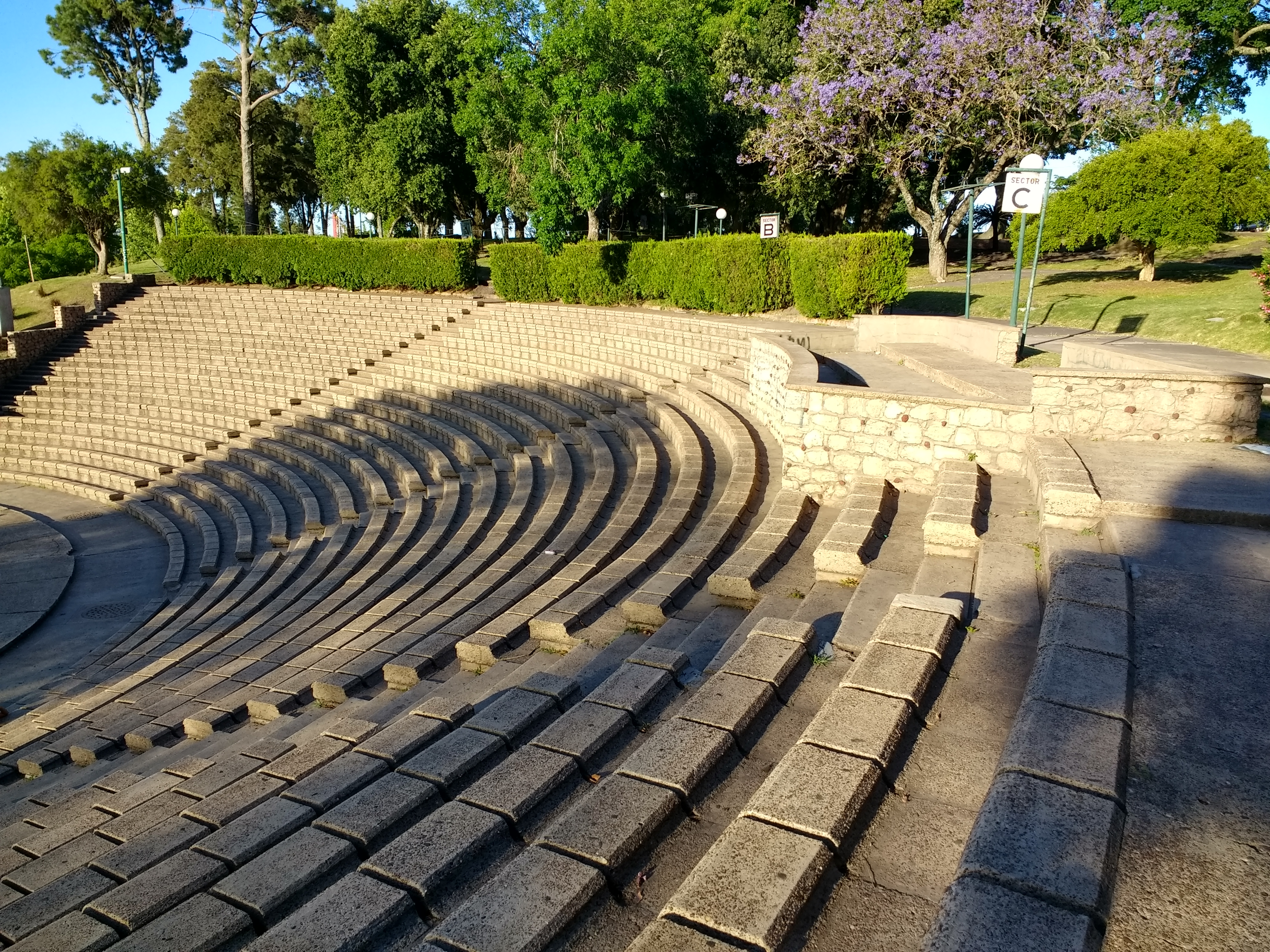 Teatro de Verano, Fray Bentos, Uruguay.